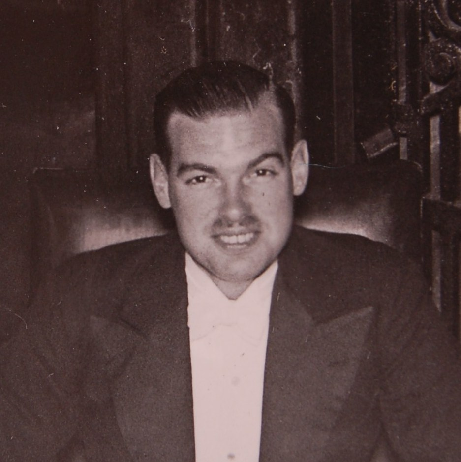 Ernst de Jonge, praeses collegii